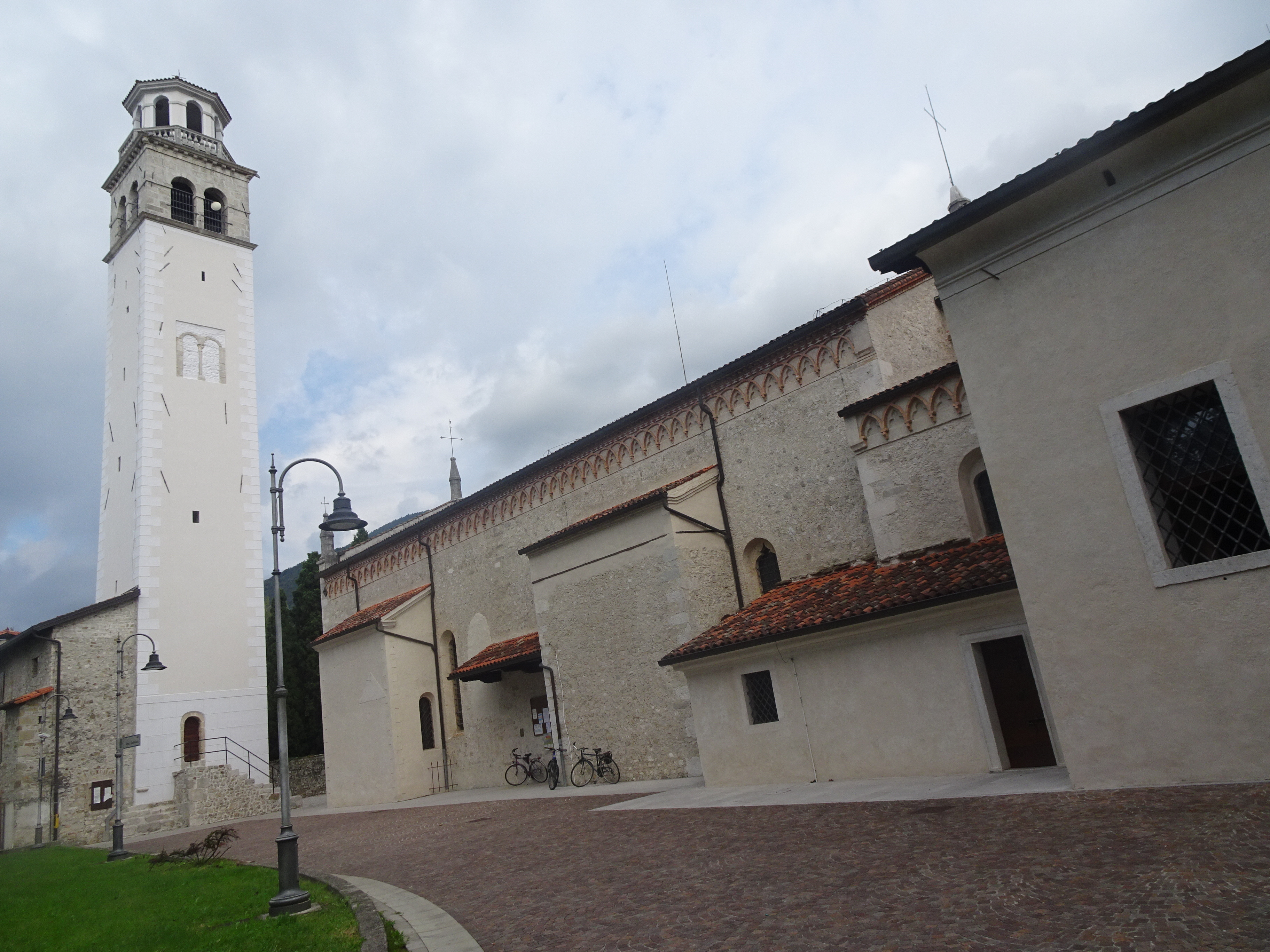 Maniago, župnijska cerkev sv. Mavra